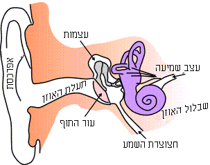 מקור ללא כתוביות